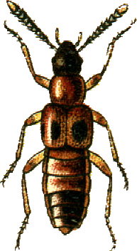 This file has been extracted from another file: Jacobs13.jpg